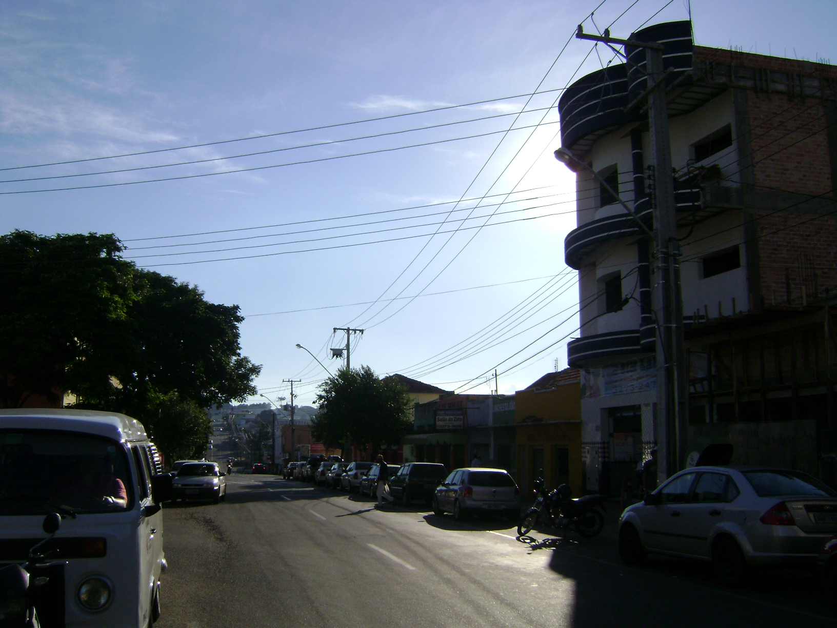 Avenida Marechal Floriano Peixoto, bairro Socomim, em Telêmaco Borba, no Paraná, em 2010.